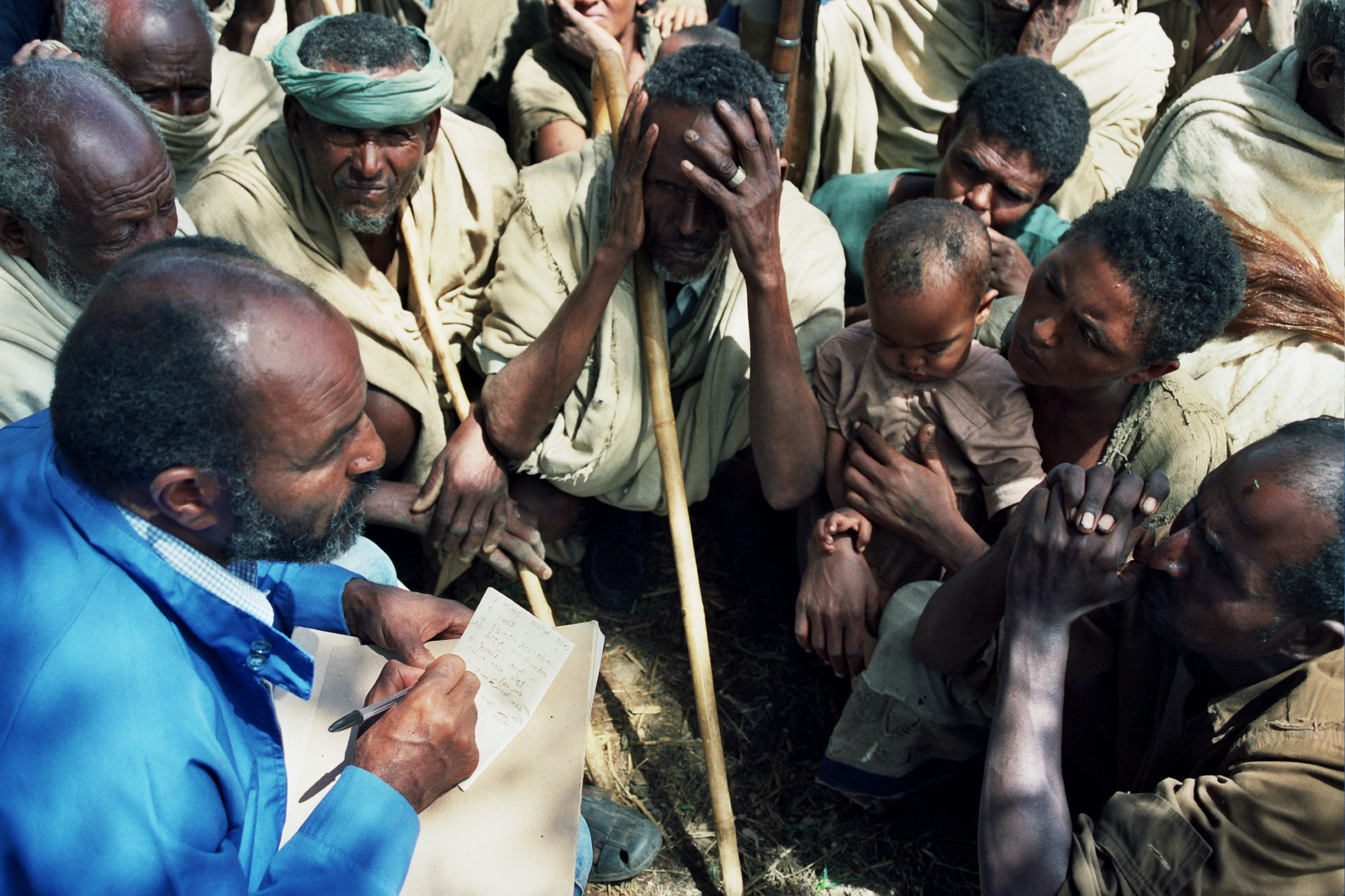 ברהני ויהודי אתיופיה, 1992